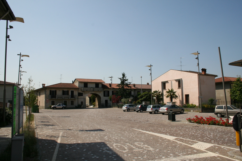 Isso BG, la piazza